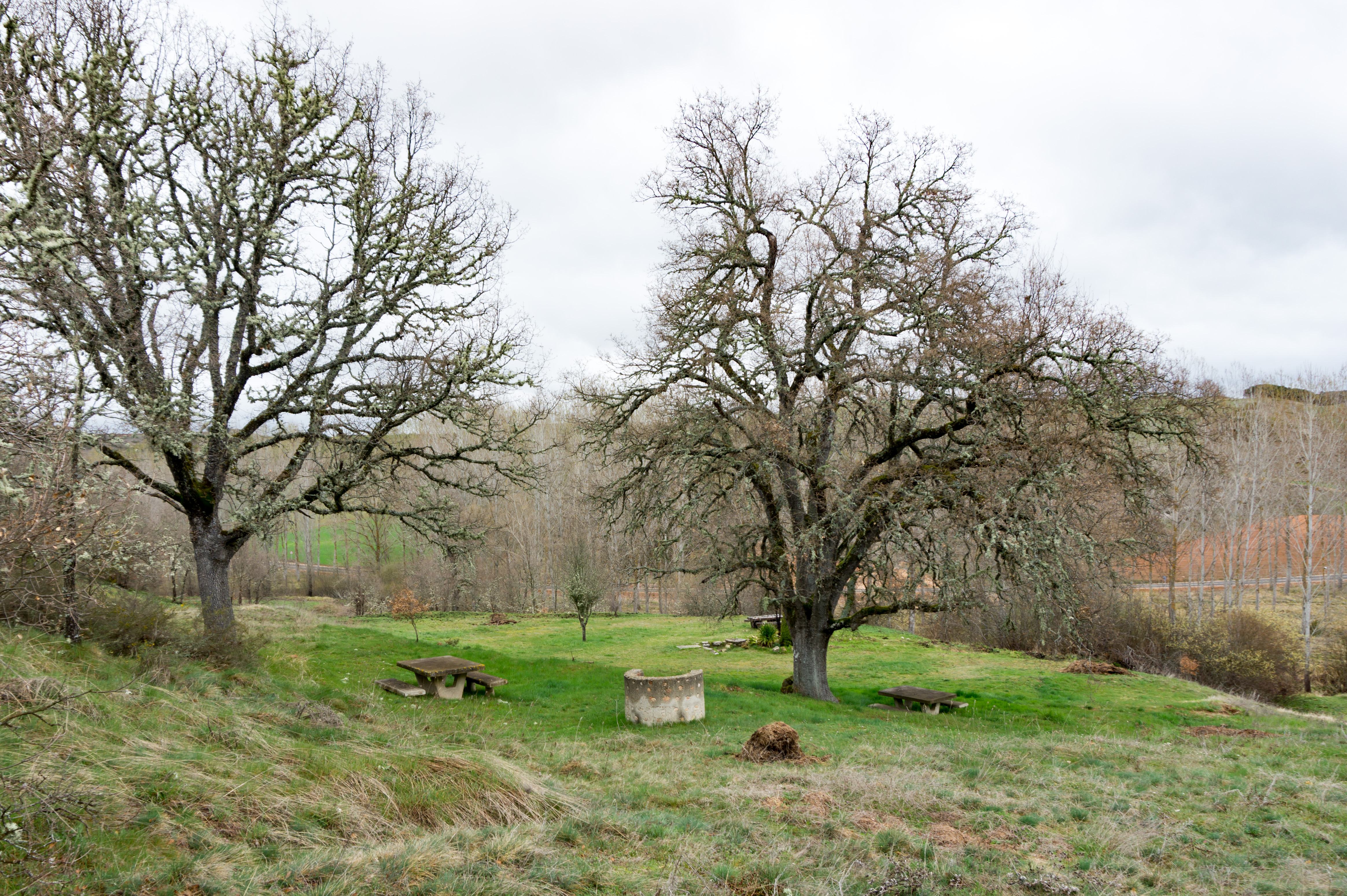 Paraje de Santa Marina de Pisón de Ojeda, donde se localizaba el desaparecido monasterio.